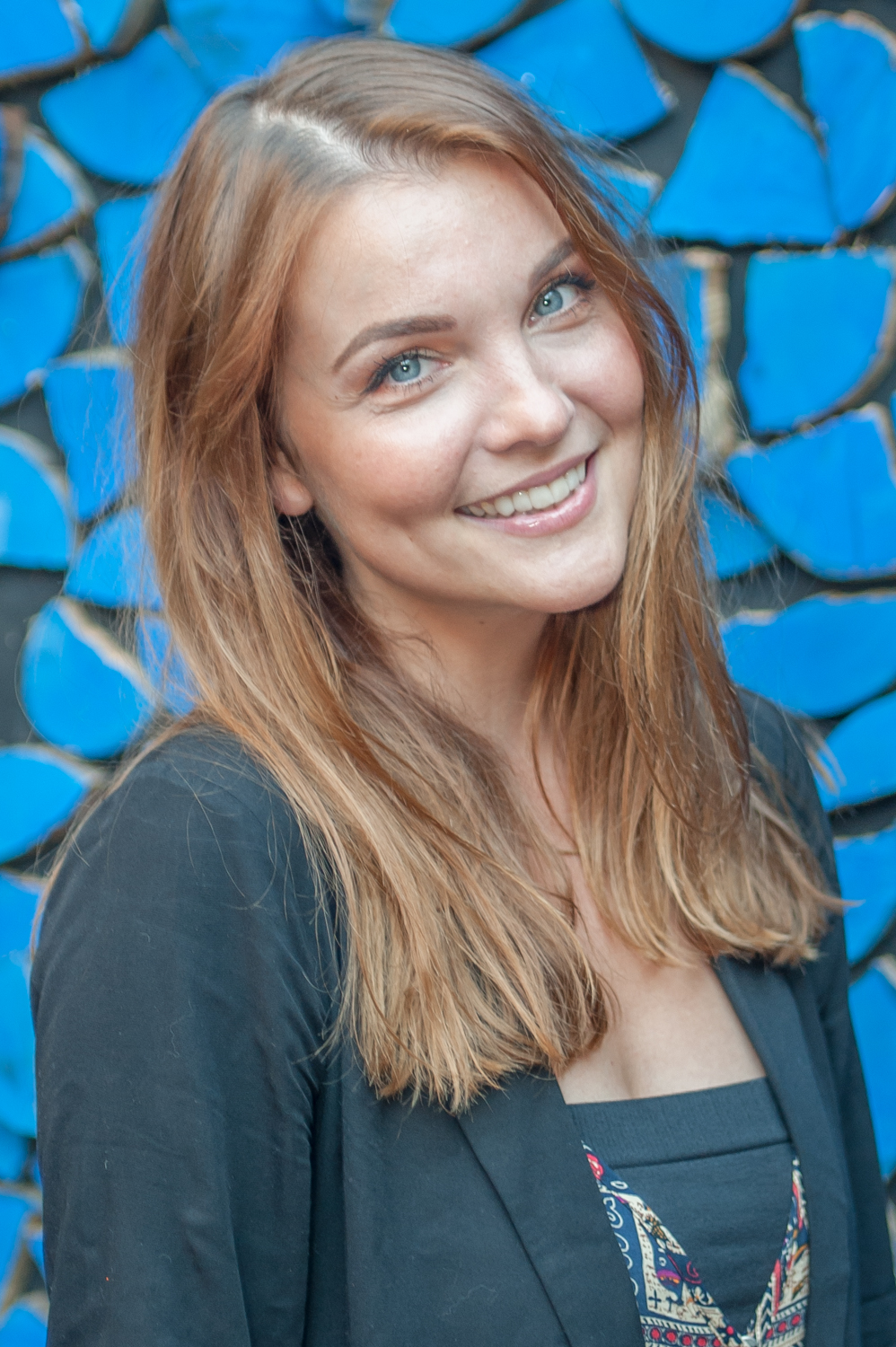 Wachaufestspiele Weißenkirchen: Premiere von „Der Brandner Kaspar und das ewig’ Leben“ am 19. Juli 2016 in Weißenkirchen. Bild zeigt Barbara Kaudelka.